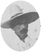 Justo Tirado